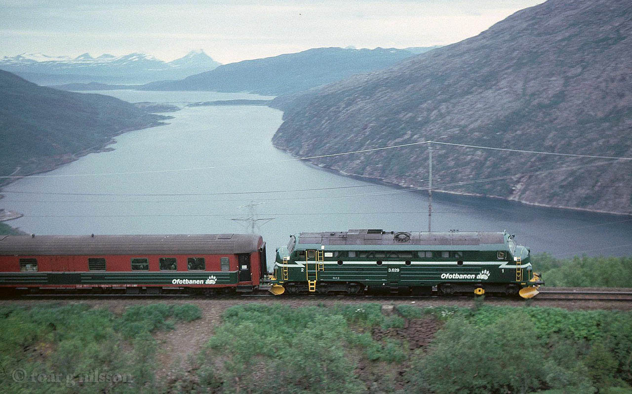 Chartertog ved Kvitur, ca. km 24 på Ofotbanen, 13. juli 2003.